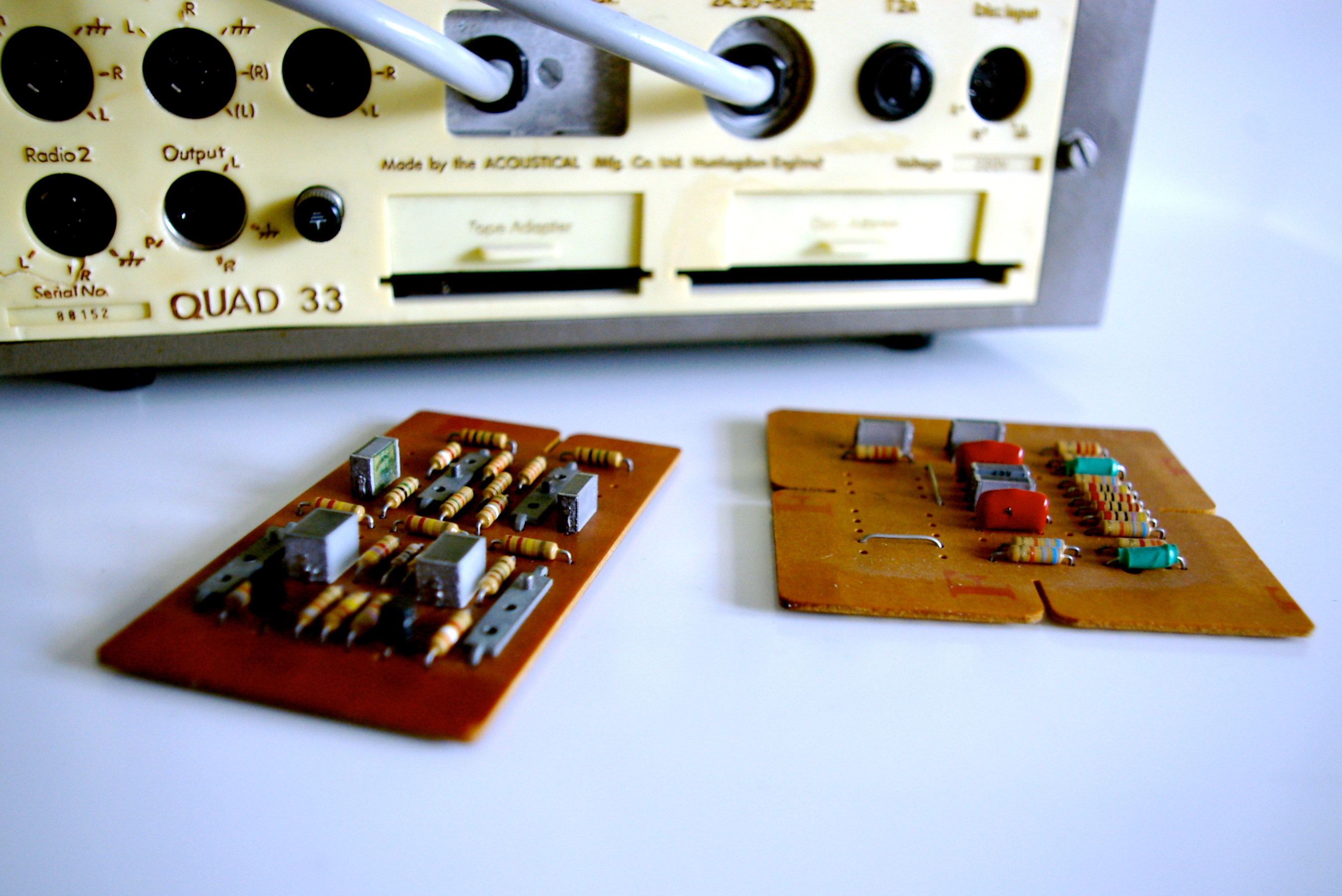 (Vorstufe Quad 33, Rückansicht, Autor: Greatarti)